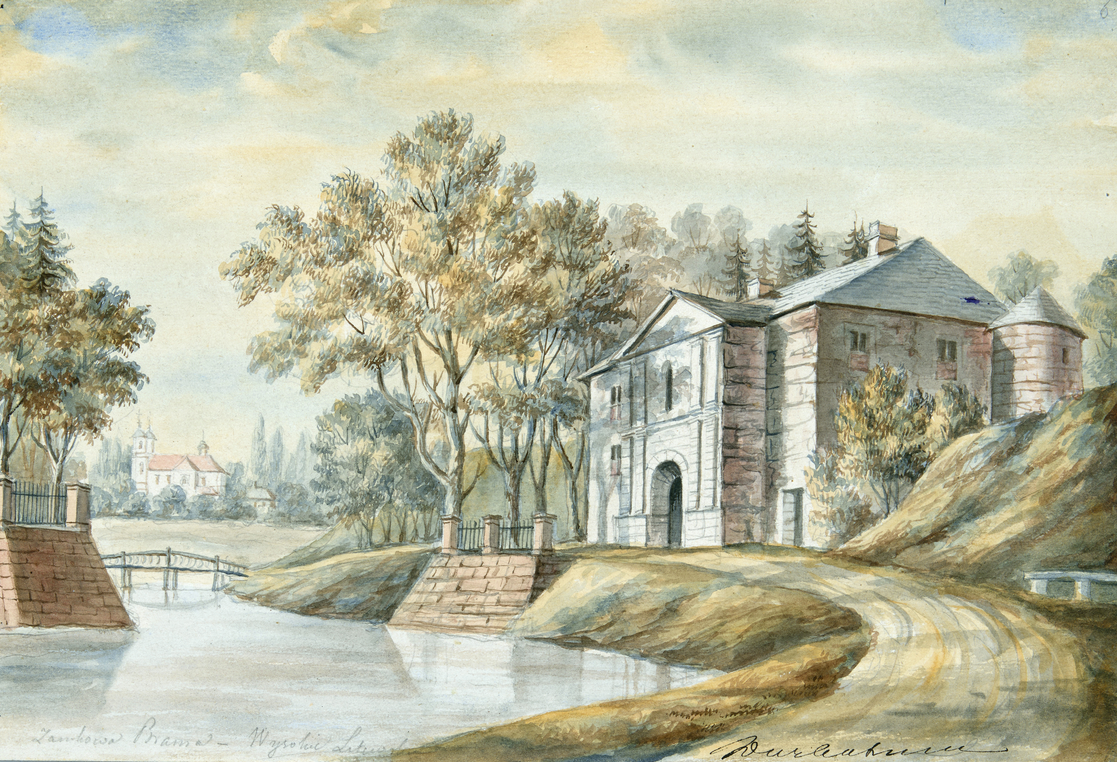 Беларуская (тарашкевіца): Высокае (Vysokaje), замак Сапегаў (Sapieha)